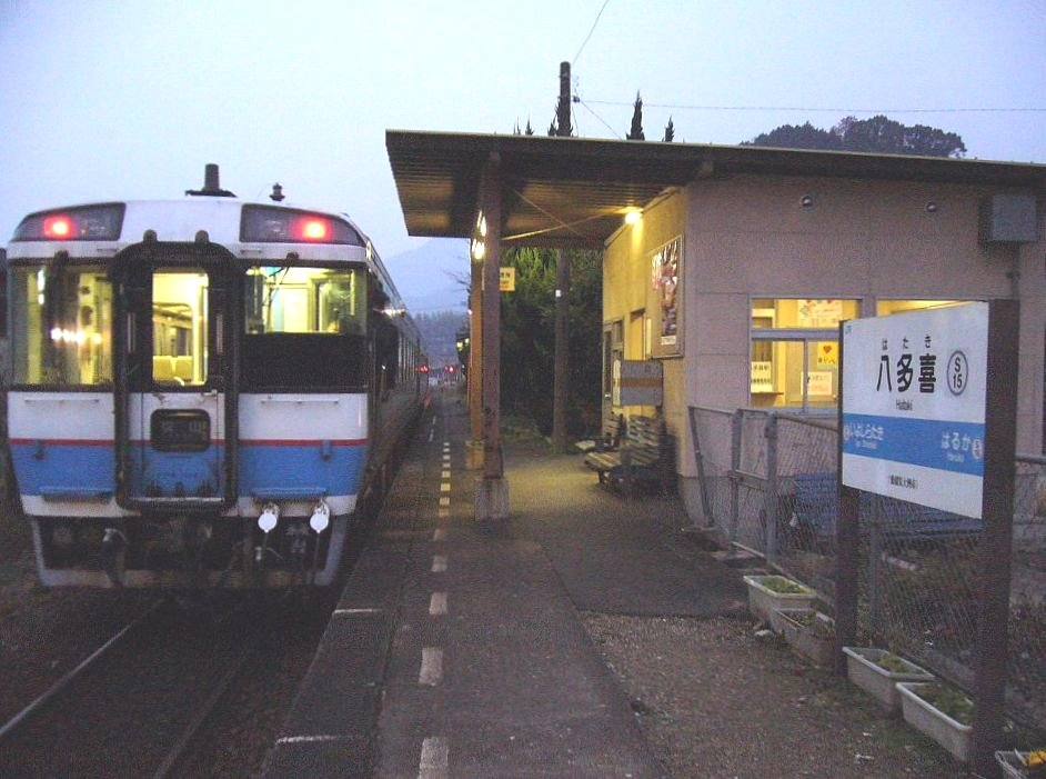 予讃線（旧線）八多喜駅 キハ185普通改造車が発車